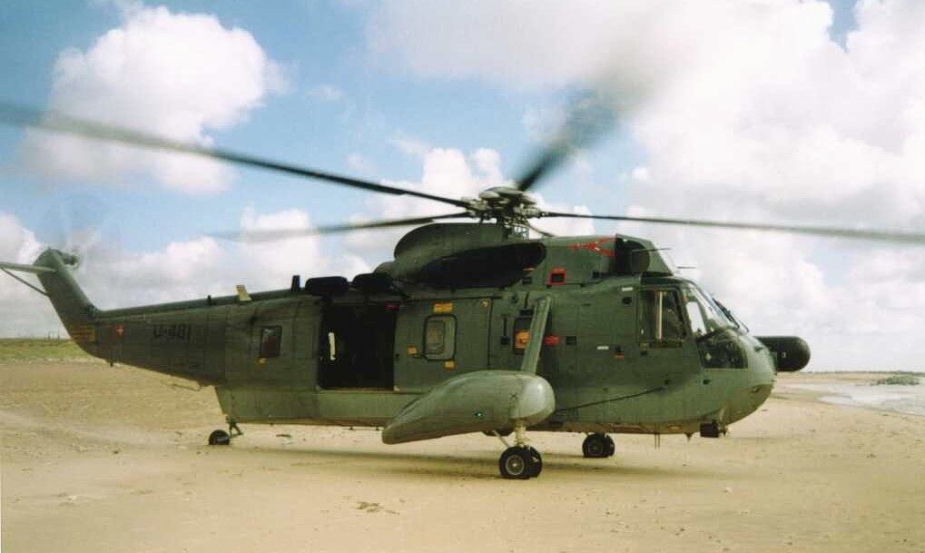 Sikorsky S-61 Seaking Hubschrauber der dänischen Marine während eines Badeunfalls am dänischen Nordseestrand im Juli 1993